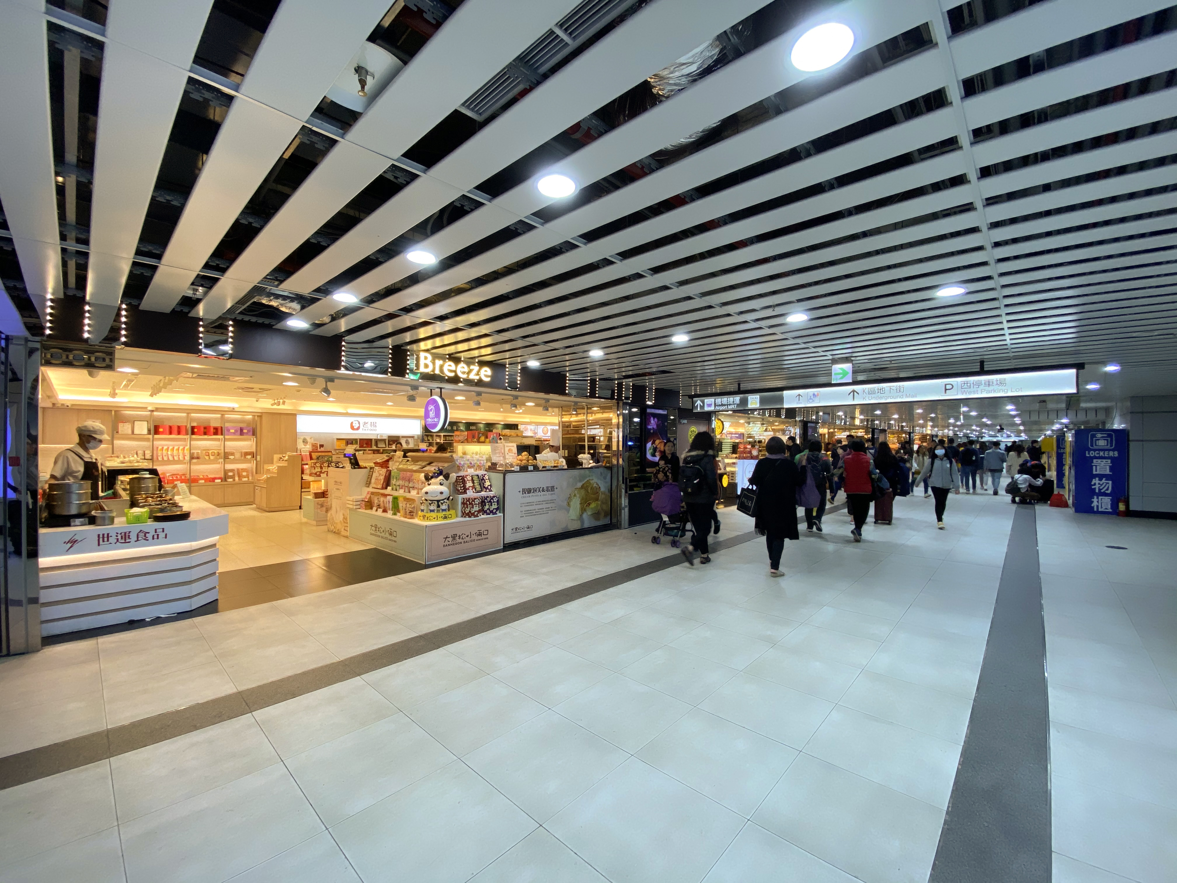 Taipei Station Breeze